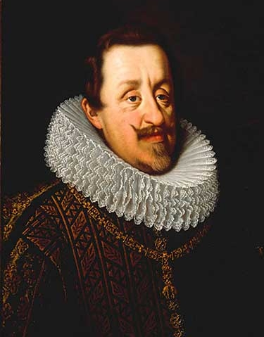 Porträt-Gemälde